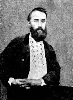 Пётр Гаврилович Успенский (с фотогр. 1860-х гг.)